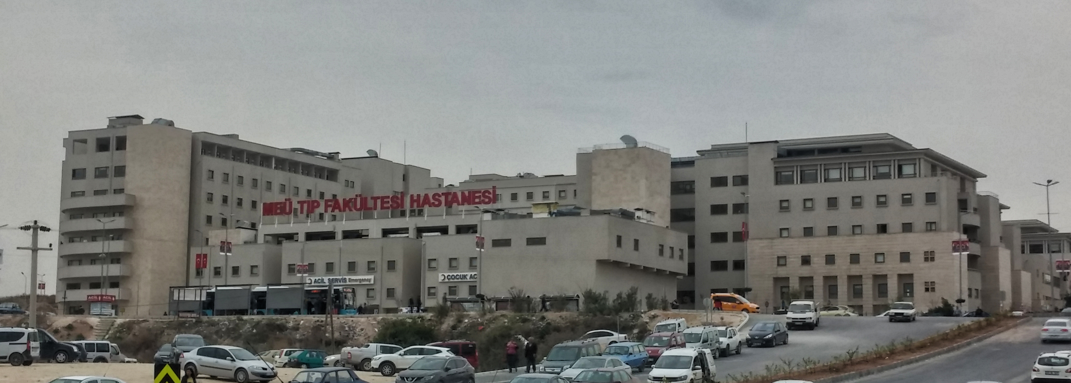 Mersin Üniversitesi Tıp Fakültesi Hastanesinden bir görünüm.